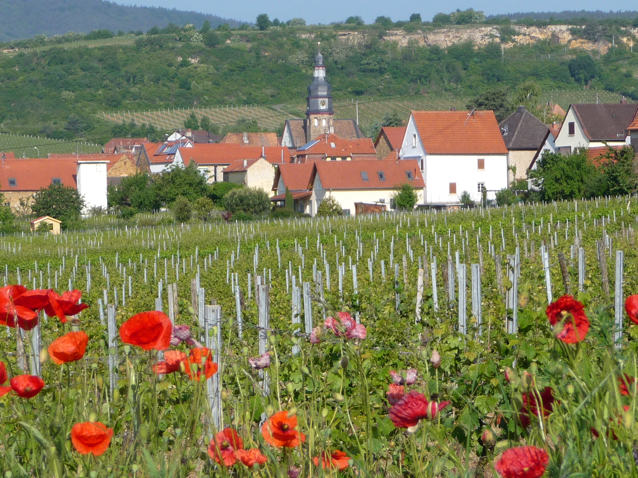 Kallstadt an der Deutschen Weinstraße ist eine Ortsgemeinde im Landkreis Bad Dürkheim in Rheinland-Pfalz.